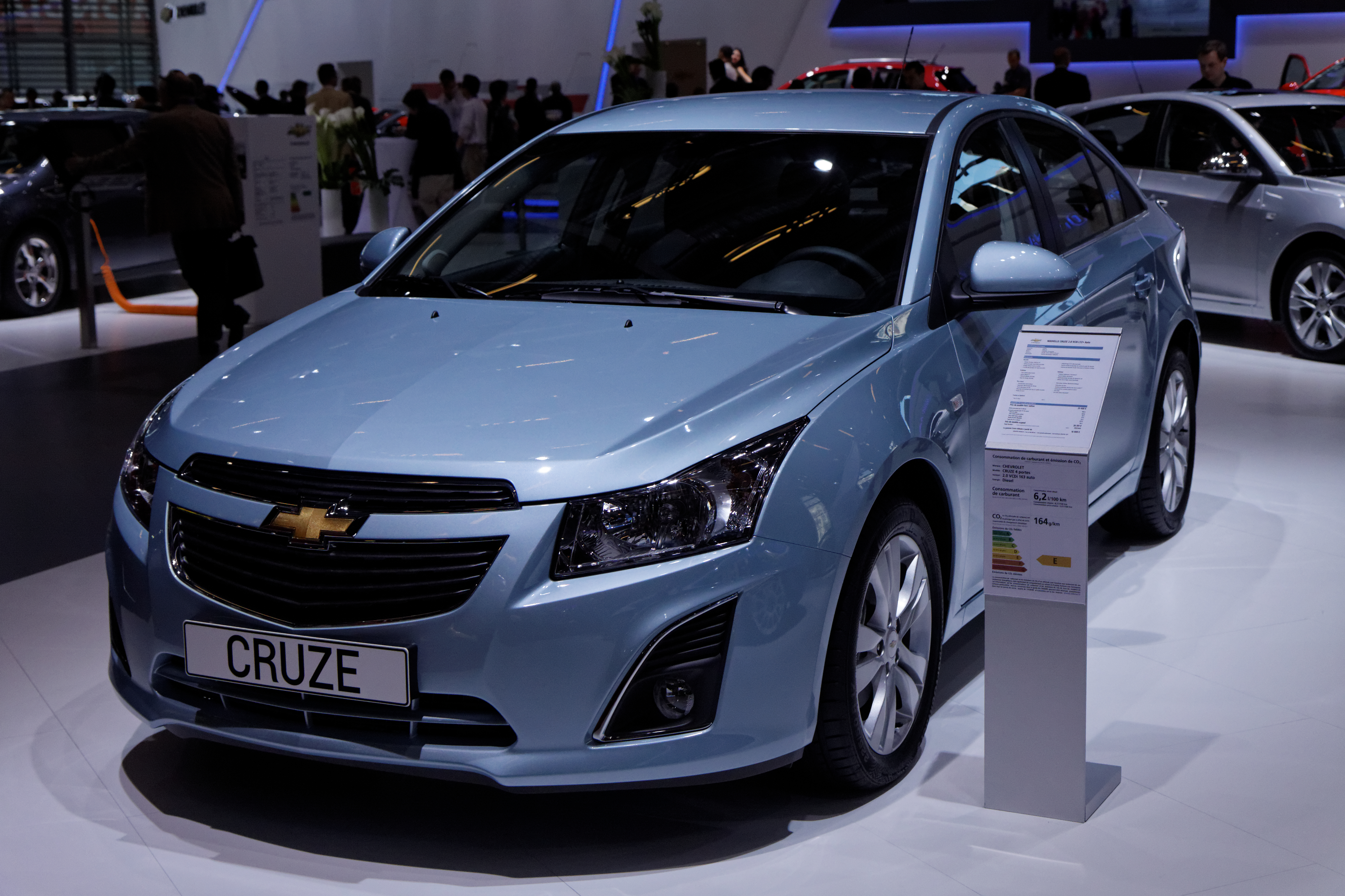 Une Chevrolet Cruze présentée lors du Mondial de l'automobile de Paris 2012.